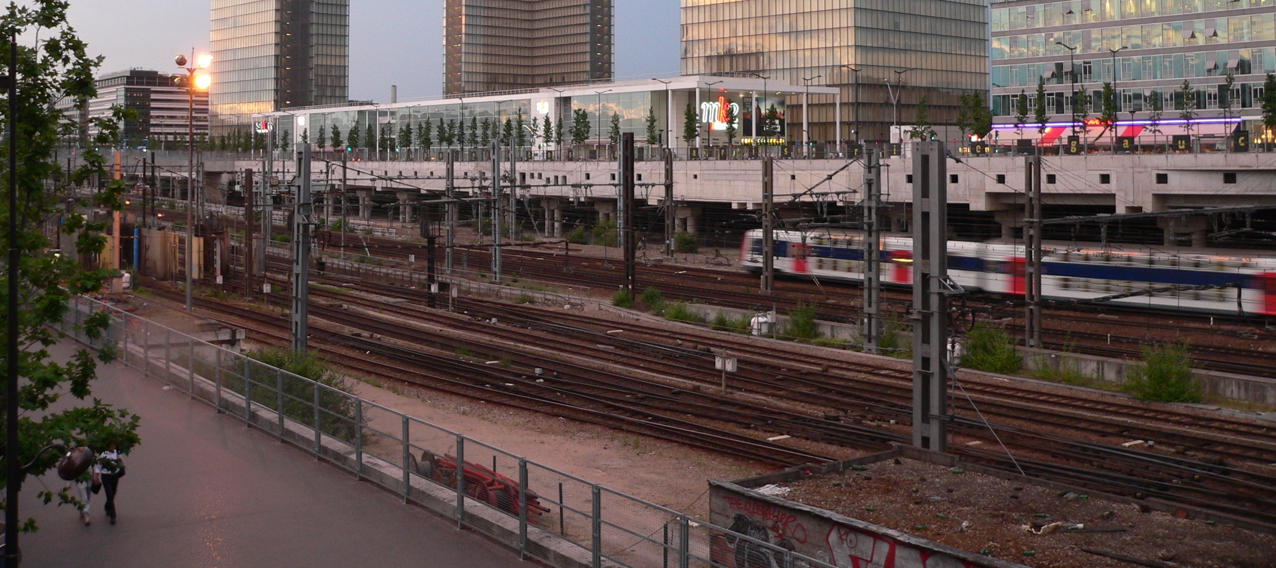 Le faisceau de voies de la Gare d'Austerlitz, à Paris, avec la Bibliothèque nationale de France derrière et la ZAC Rive Gauche derrière